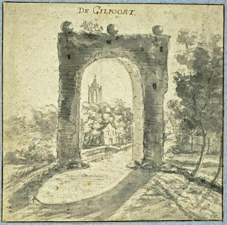 Gildpoort bij de stad Utrecht door Herman Saftleven rond 1670 afgebeeld. De poort vormde de toegang aan de noordoostzijde van de stad Utrecht van de daar gelegen voorstad. De poort lag tezamen met de Gildbrug aan de Biltse Grift aan de straat die heden Biltstraat heet.